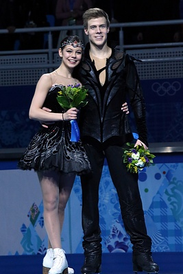 Елена Ильиных и Никита Кацалапов на Олимпиаде-2014